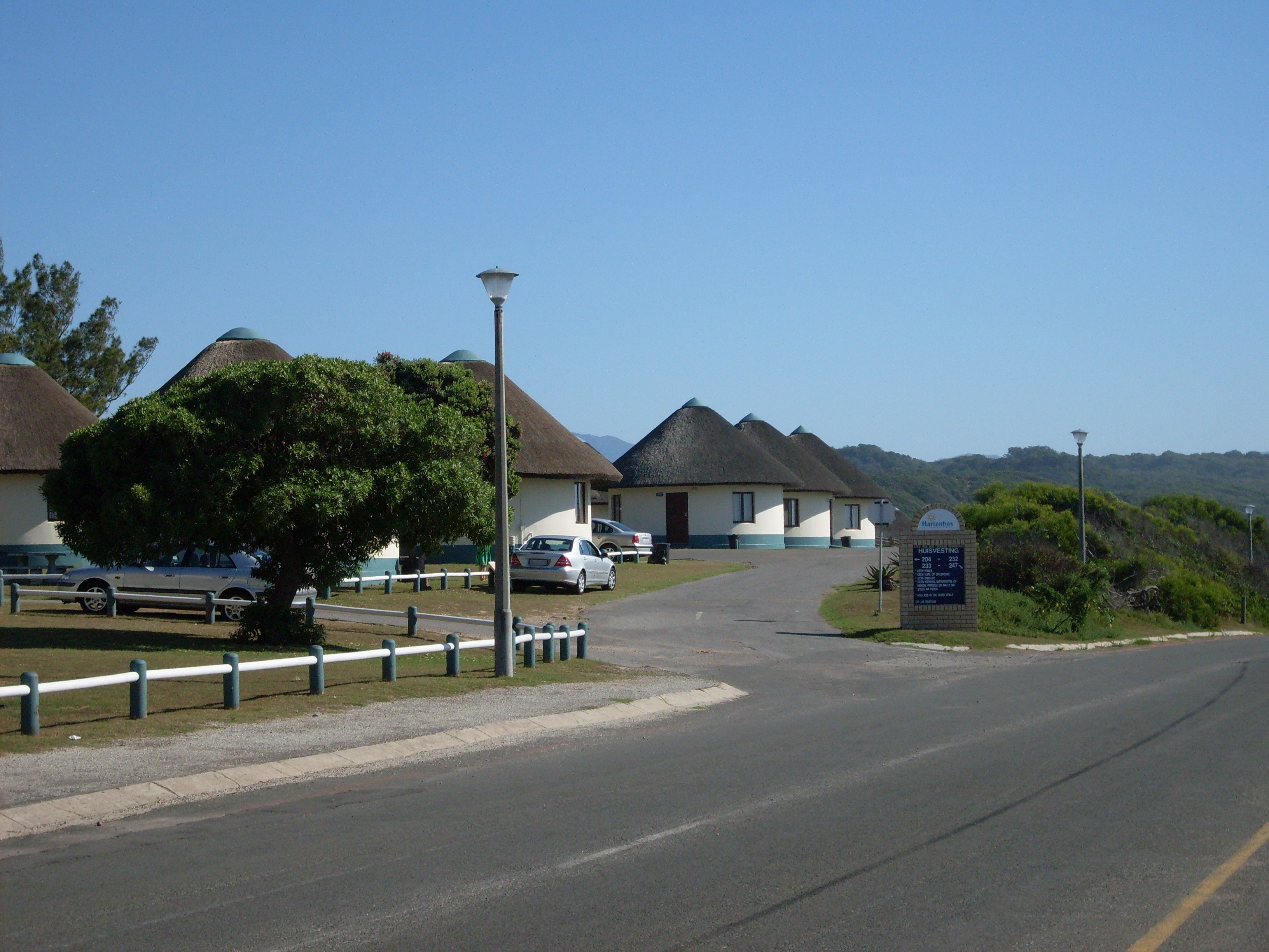 ATKVHartenbos